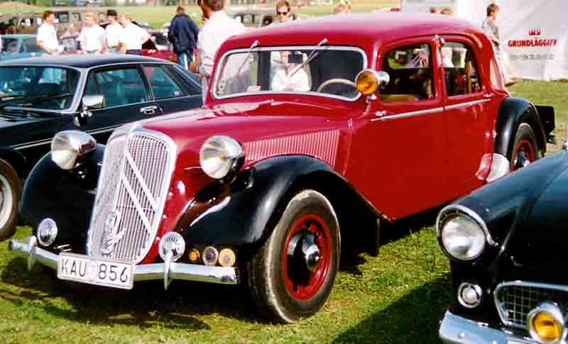 Citroen 15-Six G Berline Normale 1939